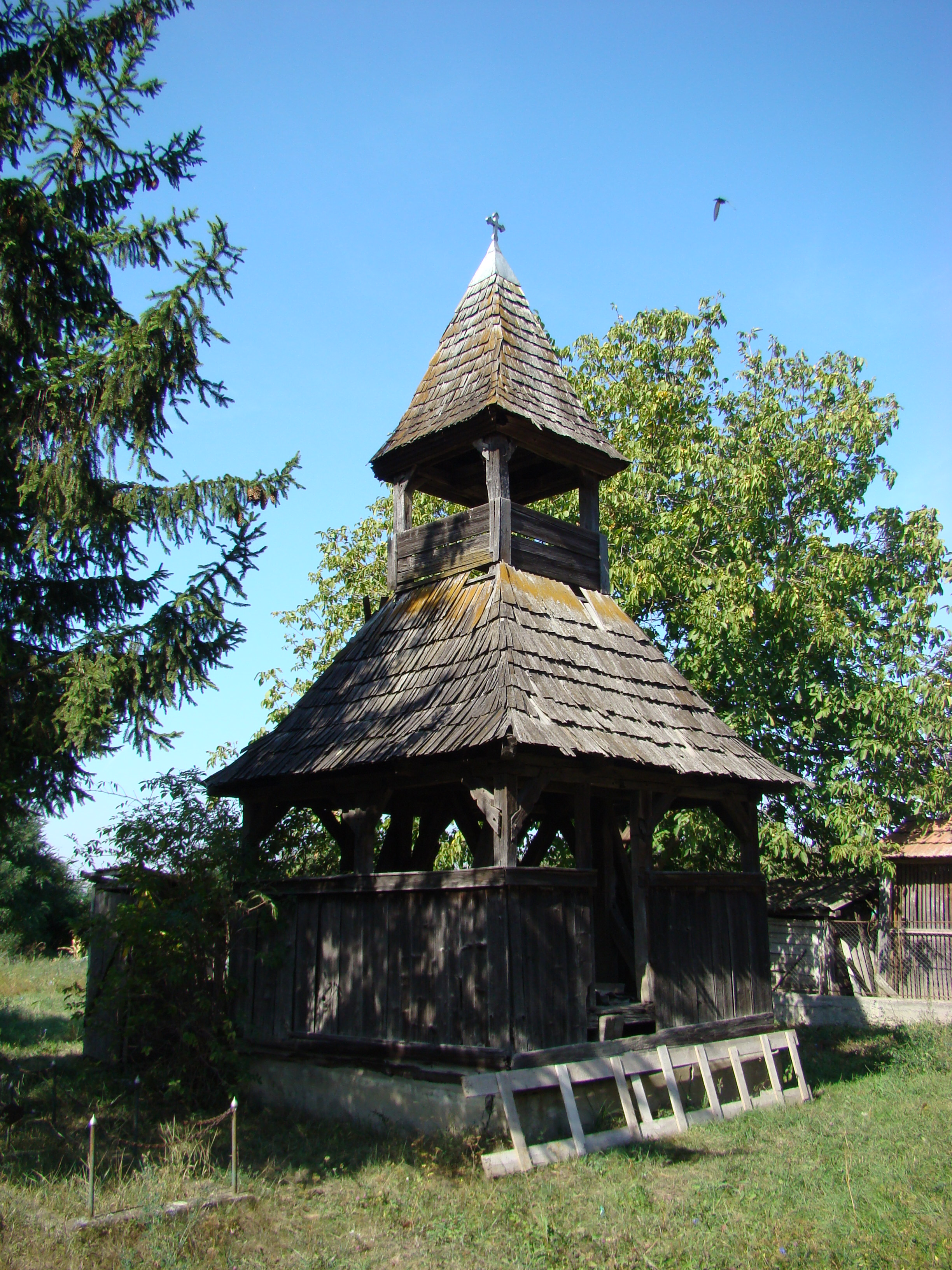 Biserica de lemn „Sf.Arhangheli” din Cerghizel-județul Mureș